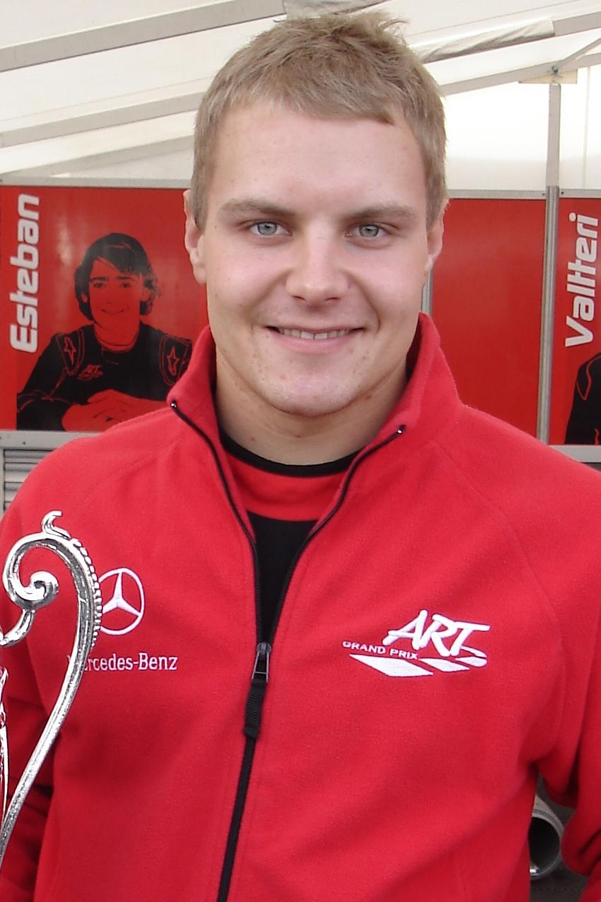 Valtteri Bottas, Bild entstanden im Rahmen des DTM-Rennwochenendes auf dem Hockenheimring.